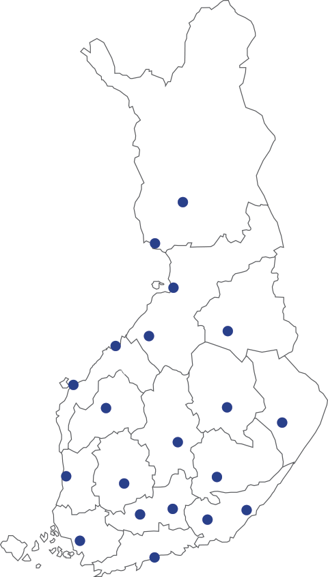 Kartta ELY-keskuksien toimipaikoista ja toimipisteistä.